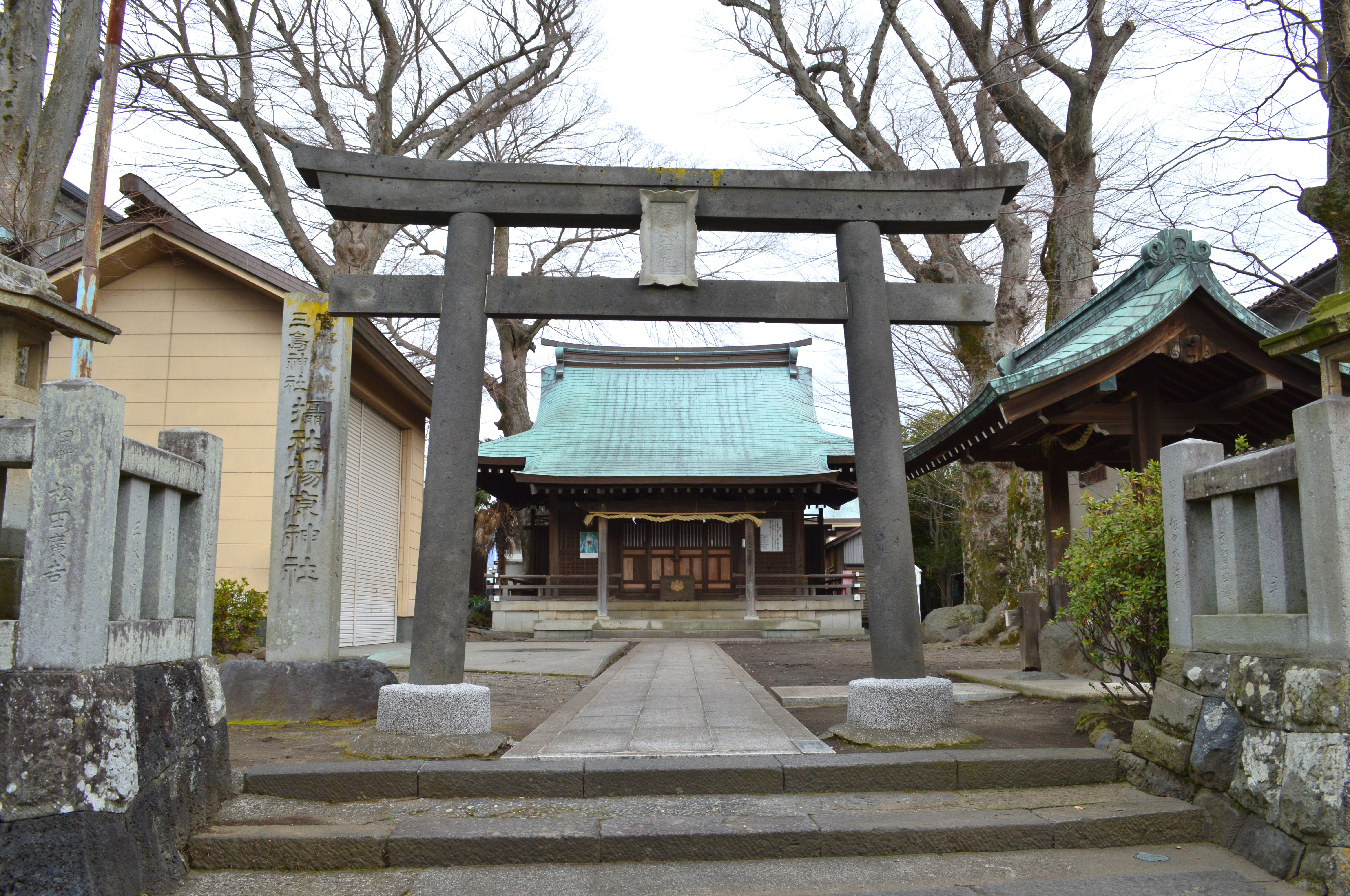 楊原神社 (三嶋大社元境外摂社)